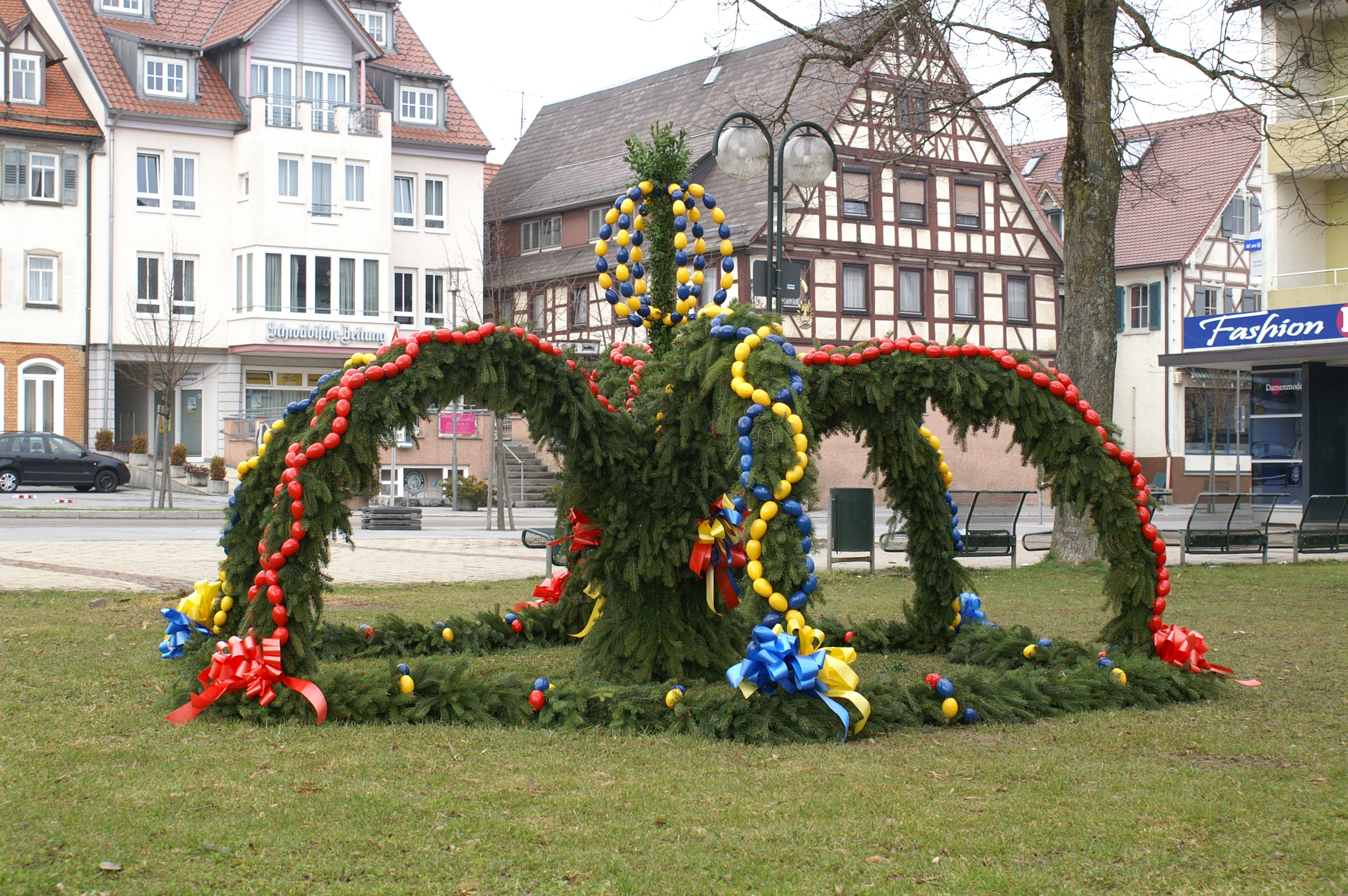 Osterschmuckstück der Laichinger Landfrauen auf dem Marktplatz